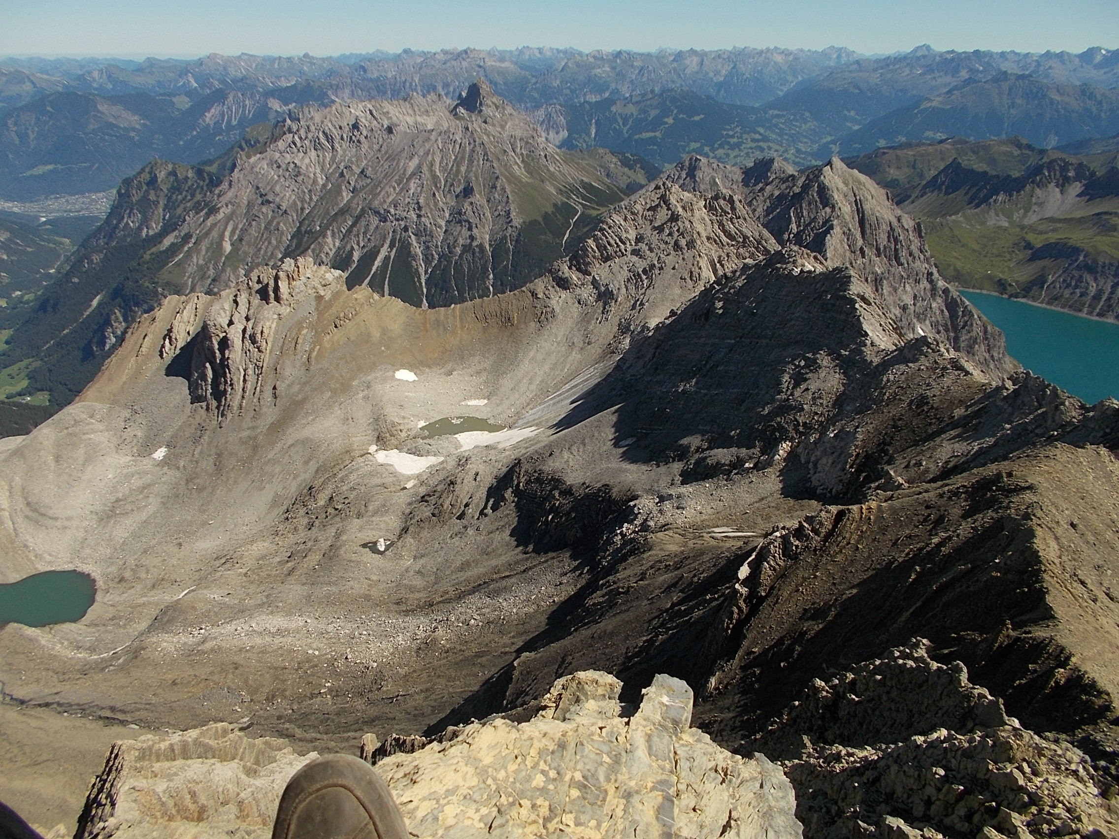 Blick von der Schesaplana auf ein separates, vom Brandner Gletscher abgespaltenes Resteisfeld unterm Sattel zwischen Felsenkopf (2835 m) und Zirmenkopf (2805m)